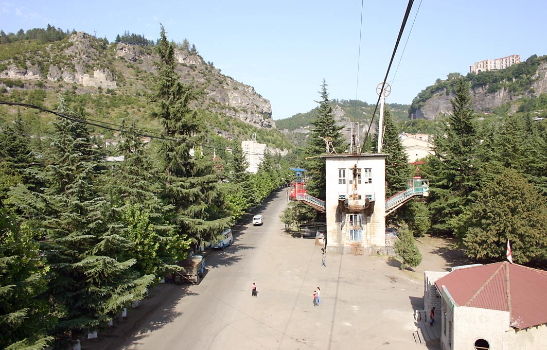 ჭიათურა = Tschiatura - Bahnhof der Seilbahn